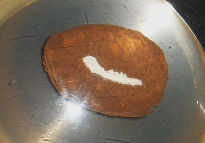 Fossil of Morganucodon, an extinct mammal-- Took the photo at Natural History Museum, London